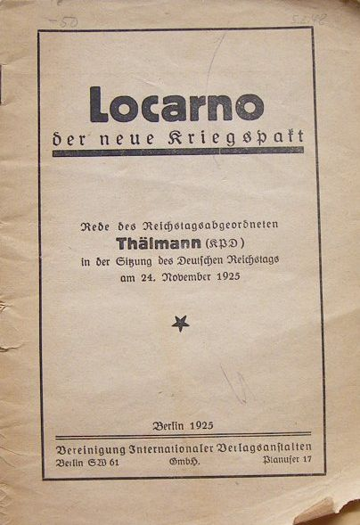 Ernst Thälmann: Locarno der neue Kriegspakt. Rede des Reichstagsabgeordneten Thälmann in der Sitzung des Deutschen Reichstages am 24. November 1925. Berlin: Vereinigung internationaler Verlagsanstalten 1925